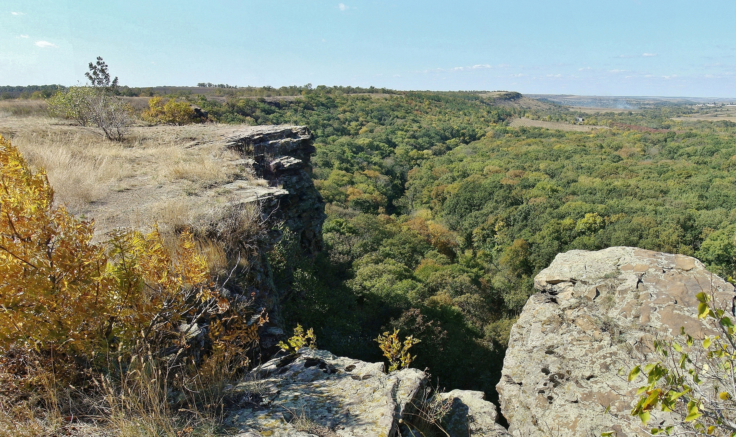 Второй.